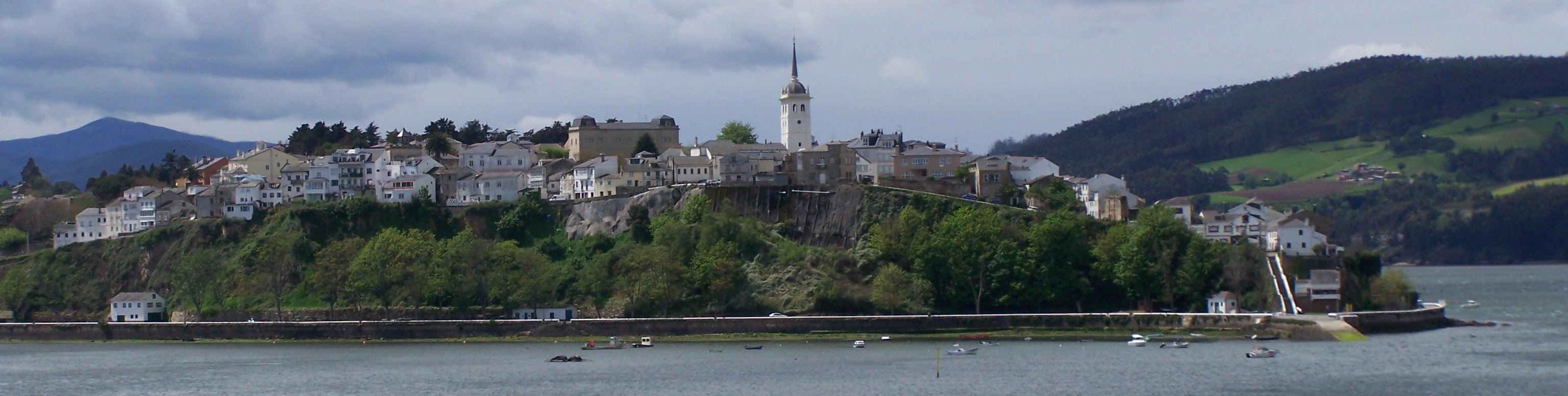 Castropol